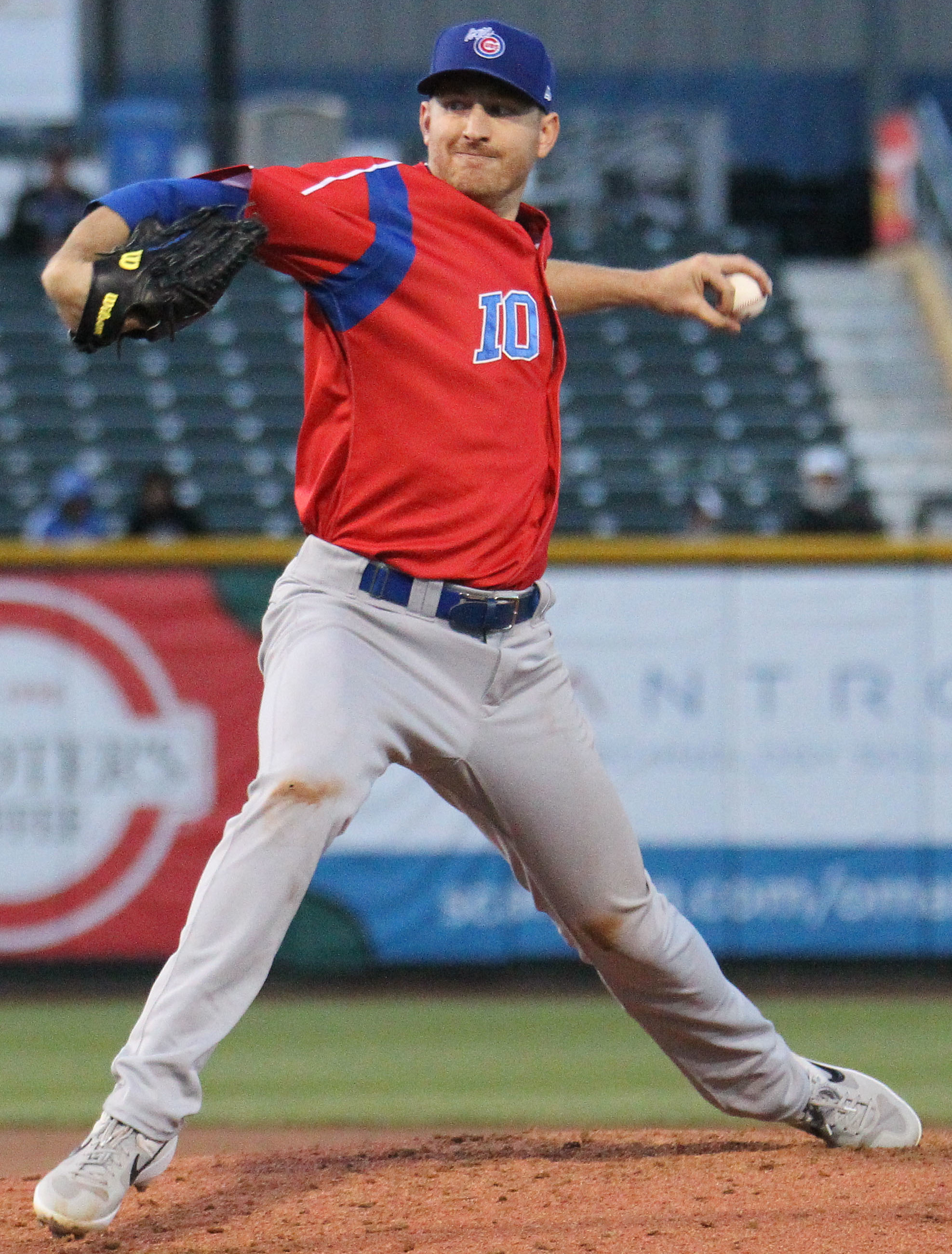 Mike Montgomery